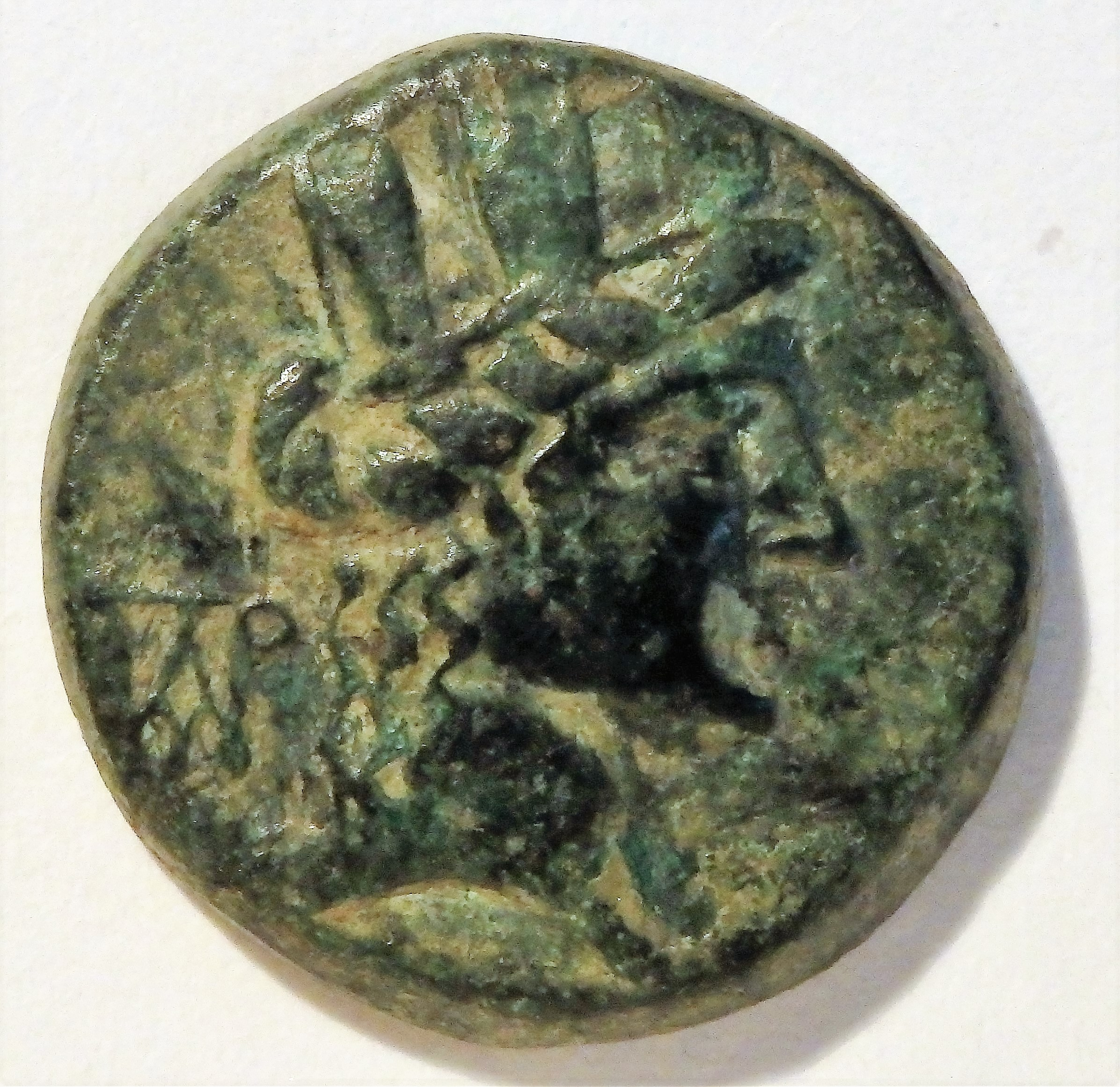 Bronzemünze aus Hieropolis Kastabala, Tychekopf mit Mauerkrone 164-10 v. Chr.